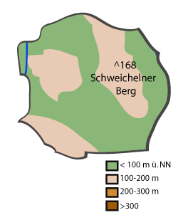 Topographical map of Hiddenhausen, Kreis Herford (Germany).